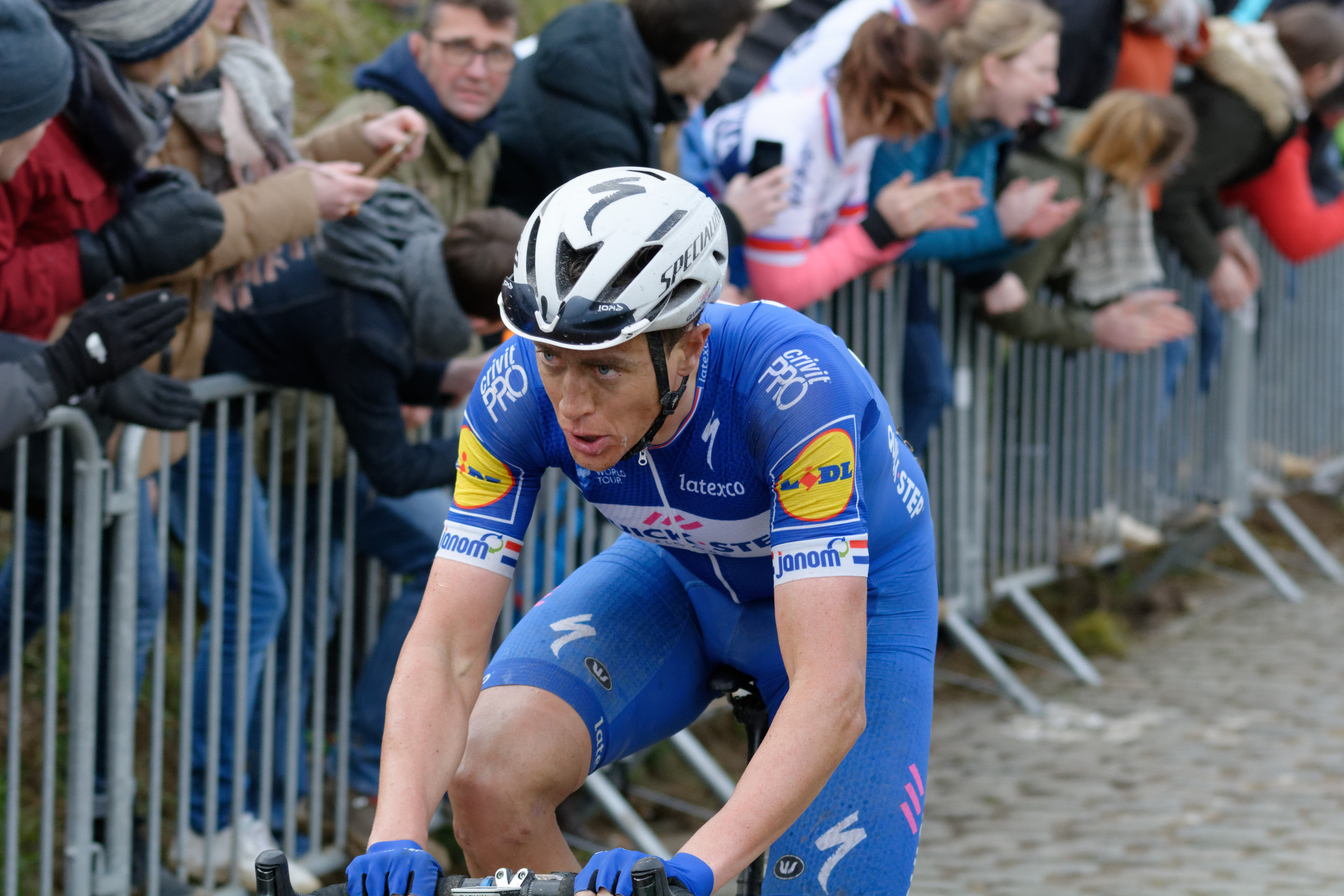 Ronde Van Vlaanderen 2018 / Tour of Flanders 2018 Oude Kwaremont